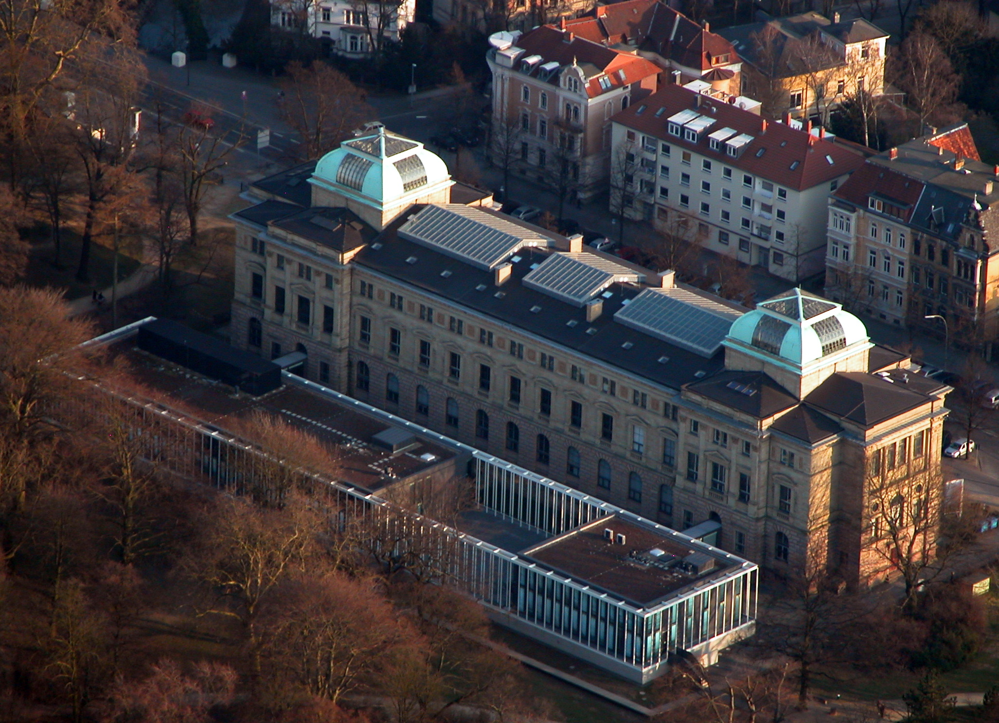 Braunschweig: Herzog Anton Ulrich-Museum (mit neuem Anbau davor) von Nordwesten gesehen.